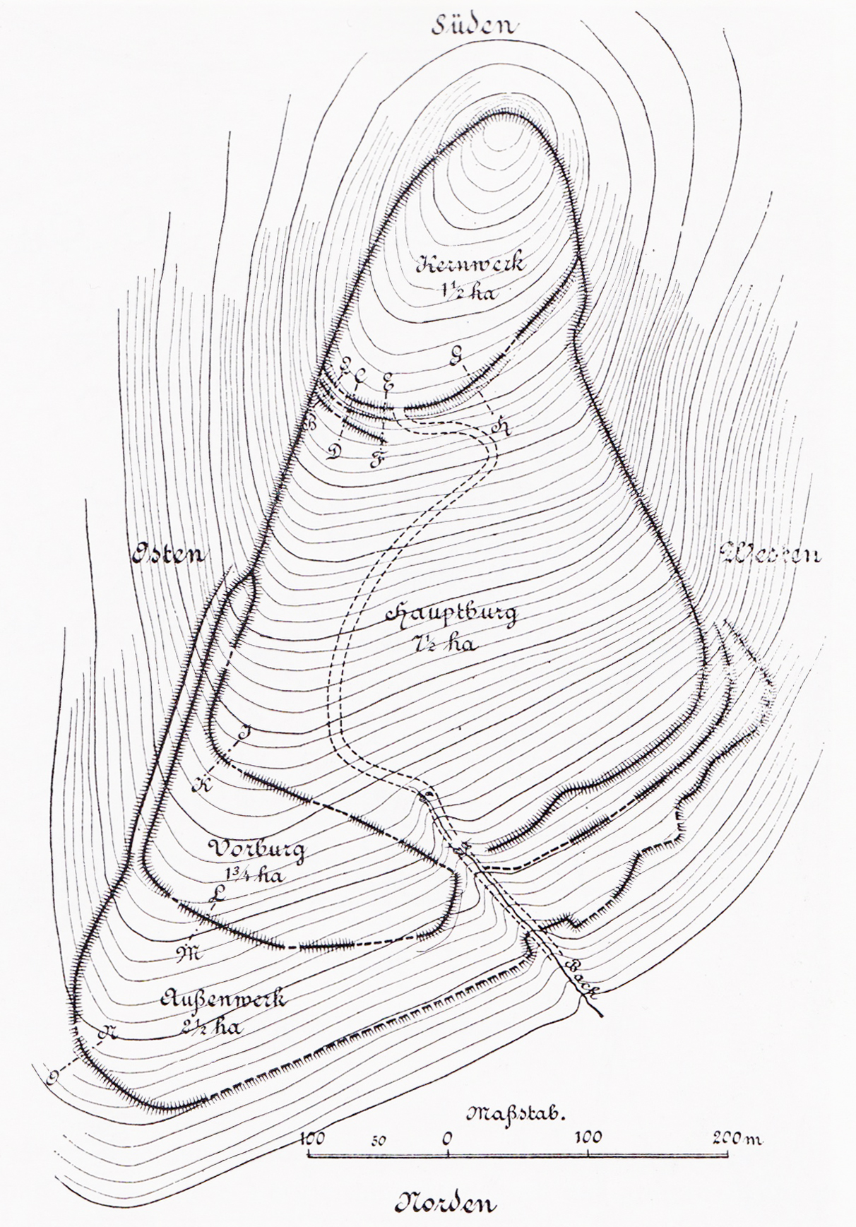 Lageplan der Babilonie bei Lübbecke von 1916 (Carl Schuchhardt 1858-1943)